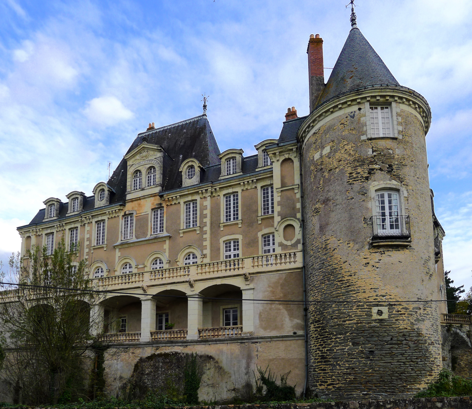 Château de Sautret (ou Sautré ?) - Feneu (Maine et Loire, France)